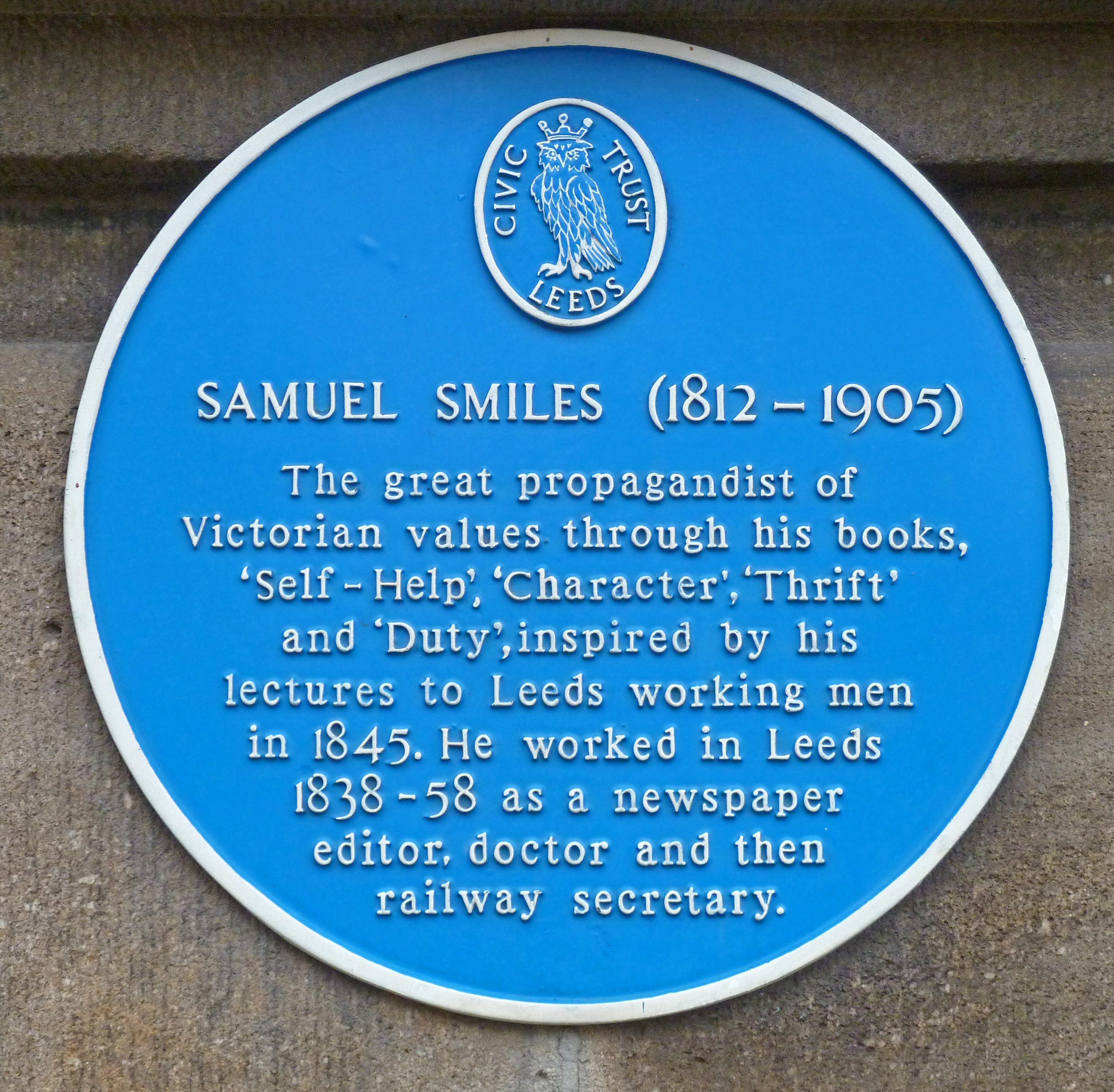 Leeds.